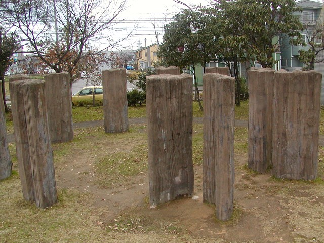 チカモリ遺跡公園 投稿者本人による撮影 Chikamori Site, Kanazawa, Ishikawa, Japan 2004年12月13日撮影